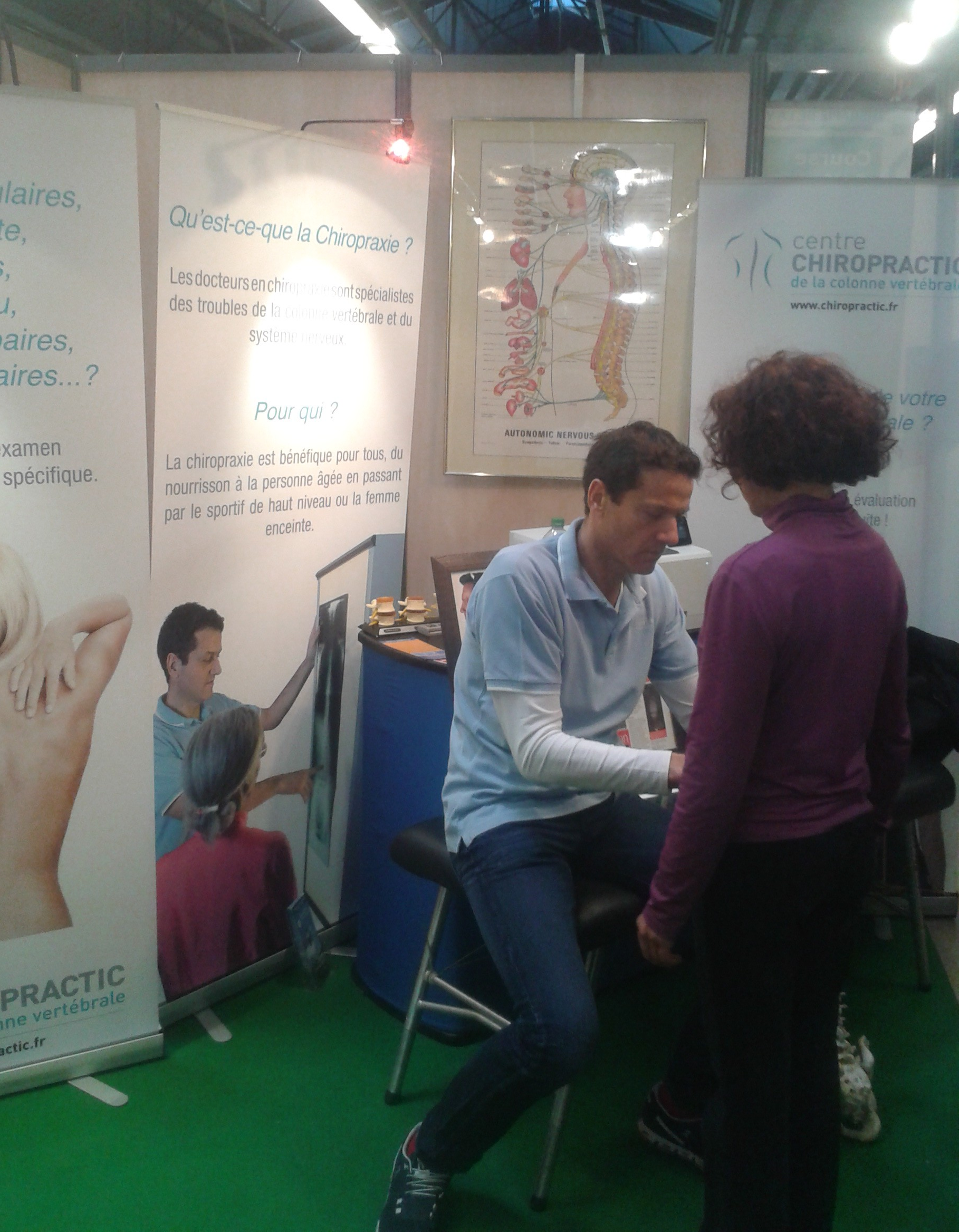 Salon Vivre autrement au Parc floral de Paris